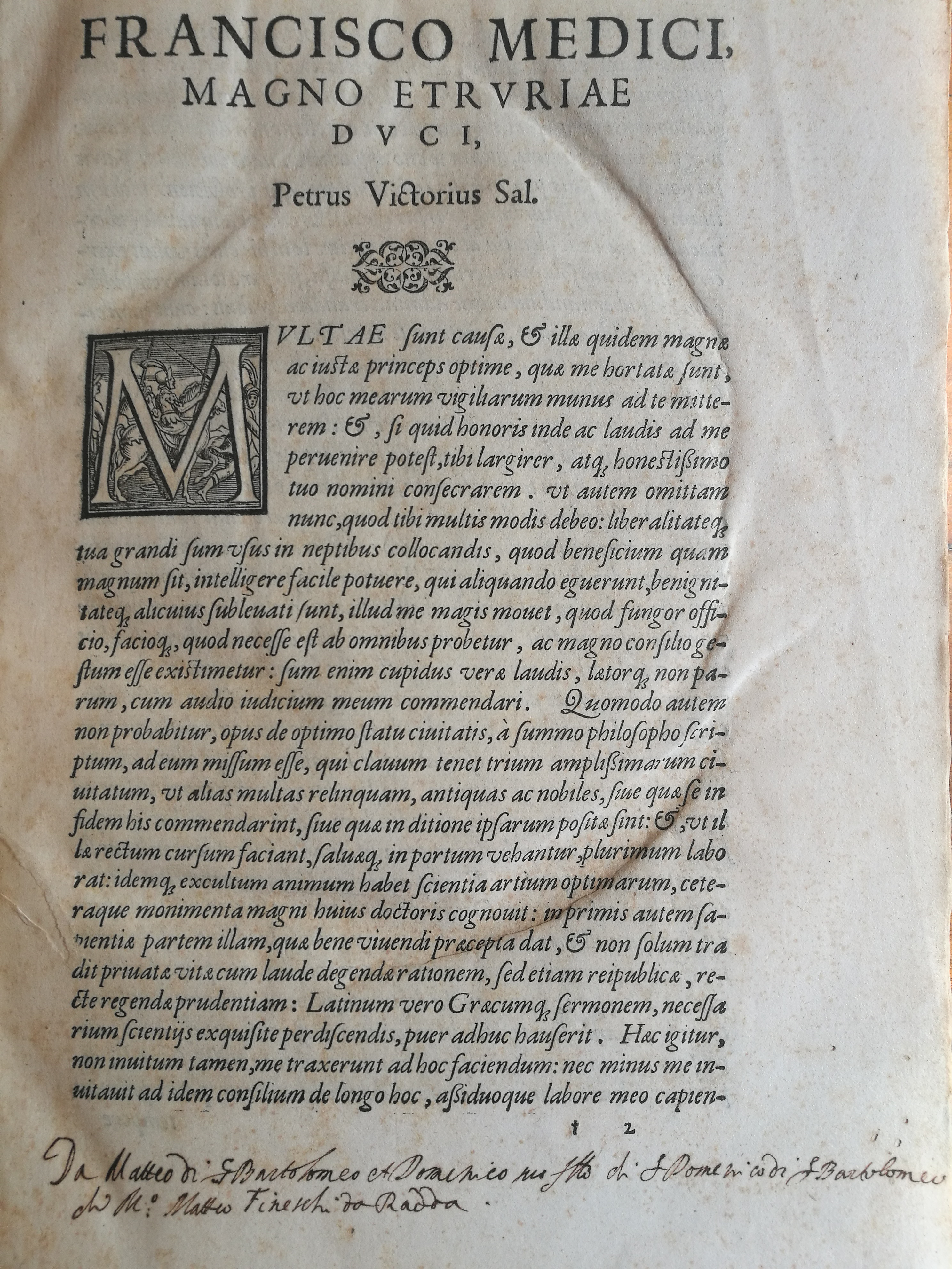 Nota di possesso di Matteo di Ser Bartolomeo e Domenico suo fratello di Ser Domenico di Ser Bartolomeo di Maestro Matteo Fineschi da Radda. Libro, "Petri Victorii, Commentarii in VIII Libros Aristotelis", Florentiae MDLXXVI. Biblioteca degli Intronati, Siena. XXXII D 22.